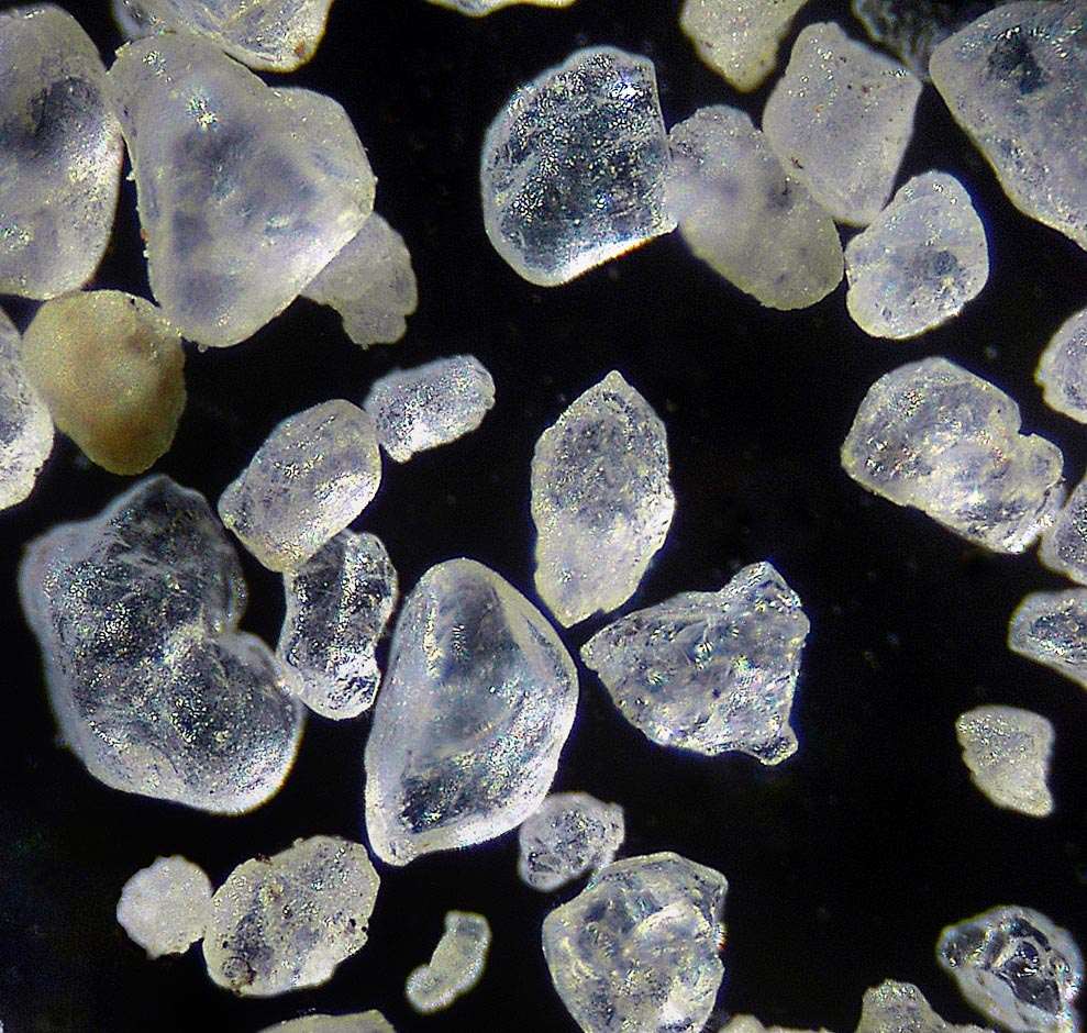 Spielsand bei ca. 200 fach im Dunkelfeld. Ausschnitt ca: 700µm x 700µm